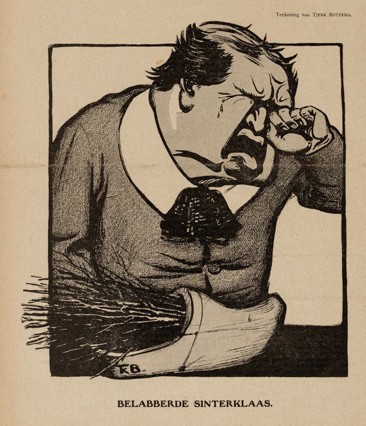 Spotprent van Abraham Kuyper door Tjerk Bottema (1882-1940)